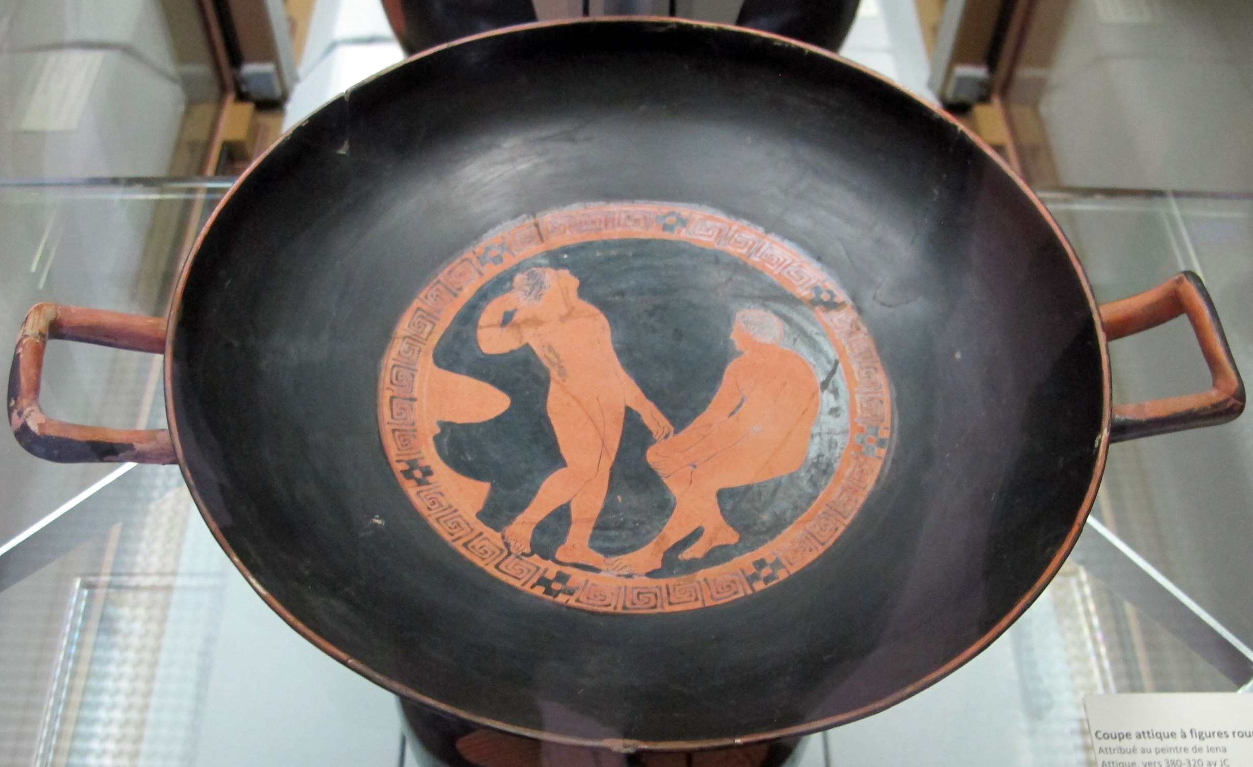 Pittore di jena, coppa attica a figure rosse, con peleo e atalanta (int), giovani (ext), attica, 380-320 ac. ca